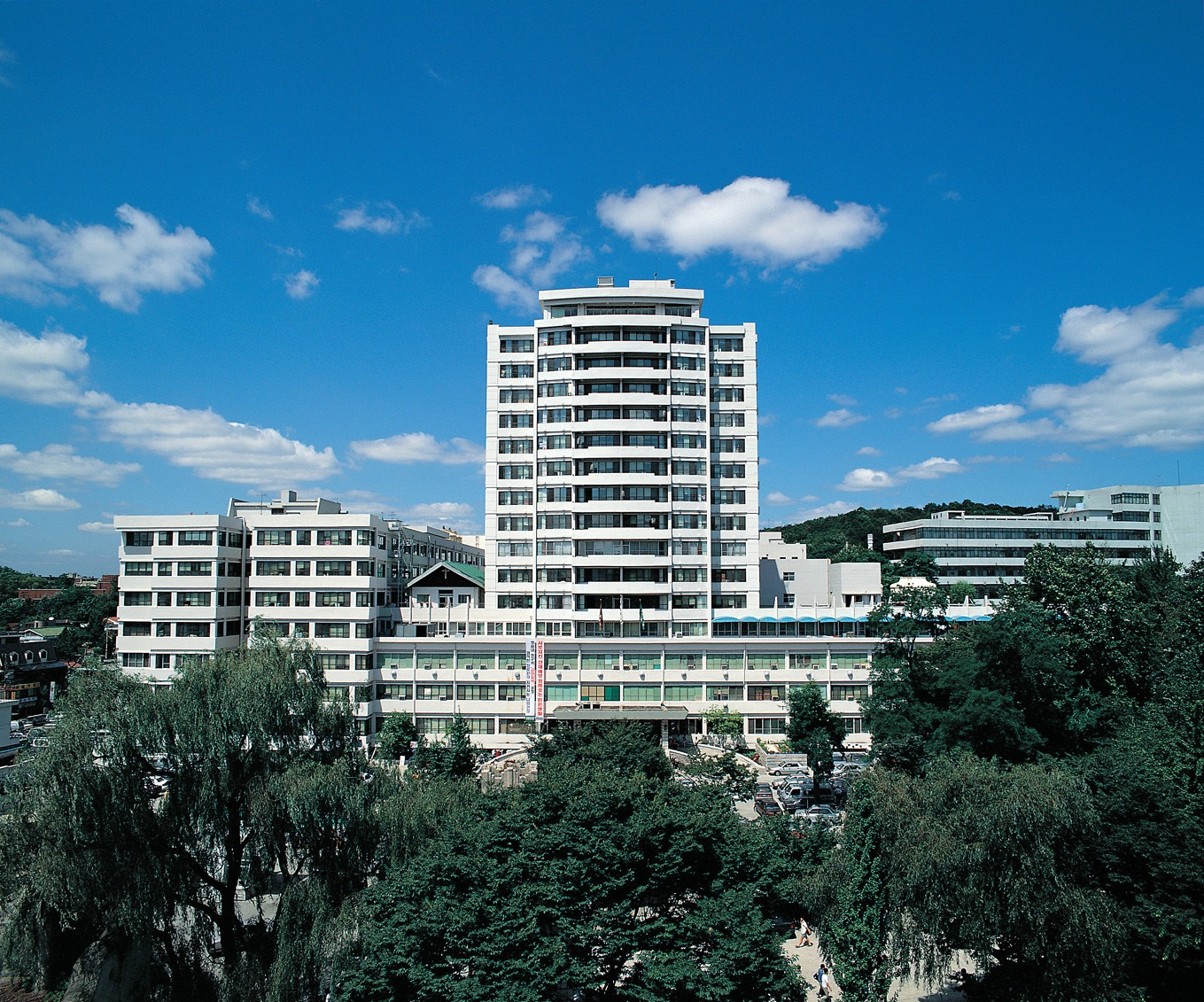 경희의료원 외관